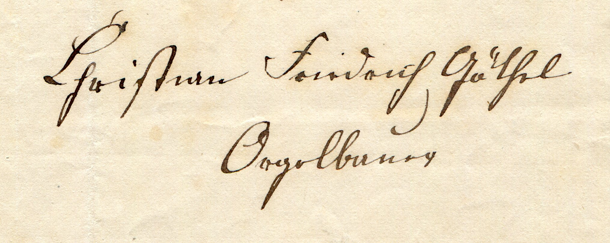 Autograph von Christian Friedrich Göthel im Pfarrarchiv Grünlichtenberg aus dem Jahre 1865